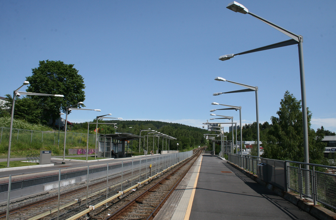 Vollebekk stasjon sett fra plattformen mot Linderud.